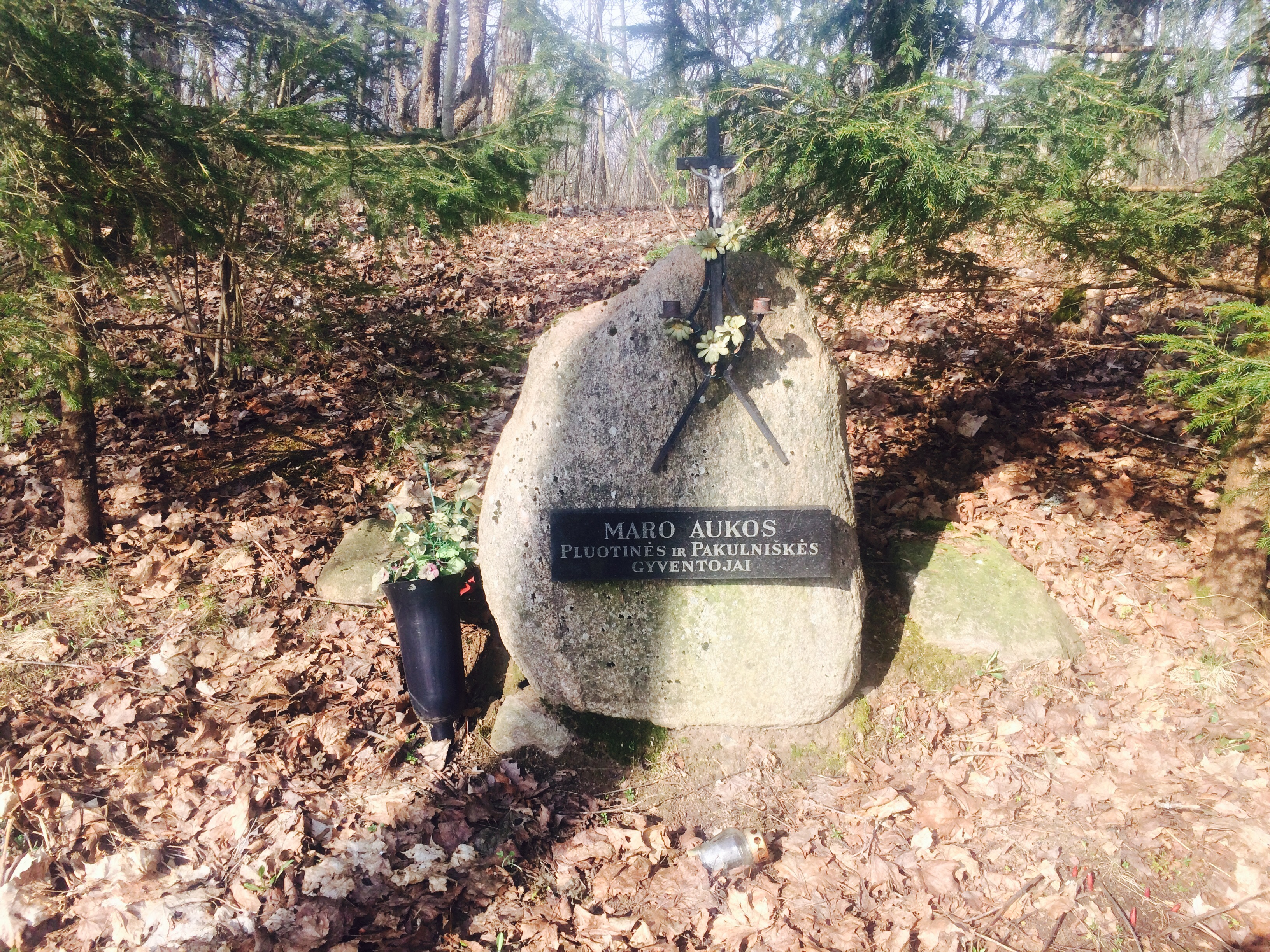 Paminklas maro aukoms